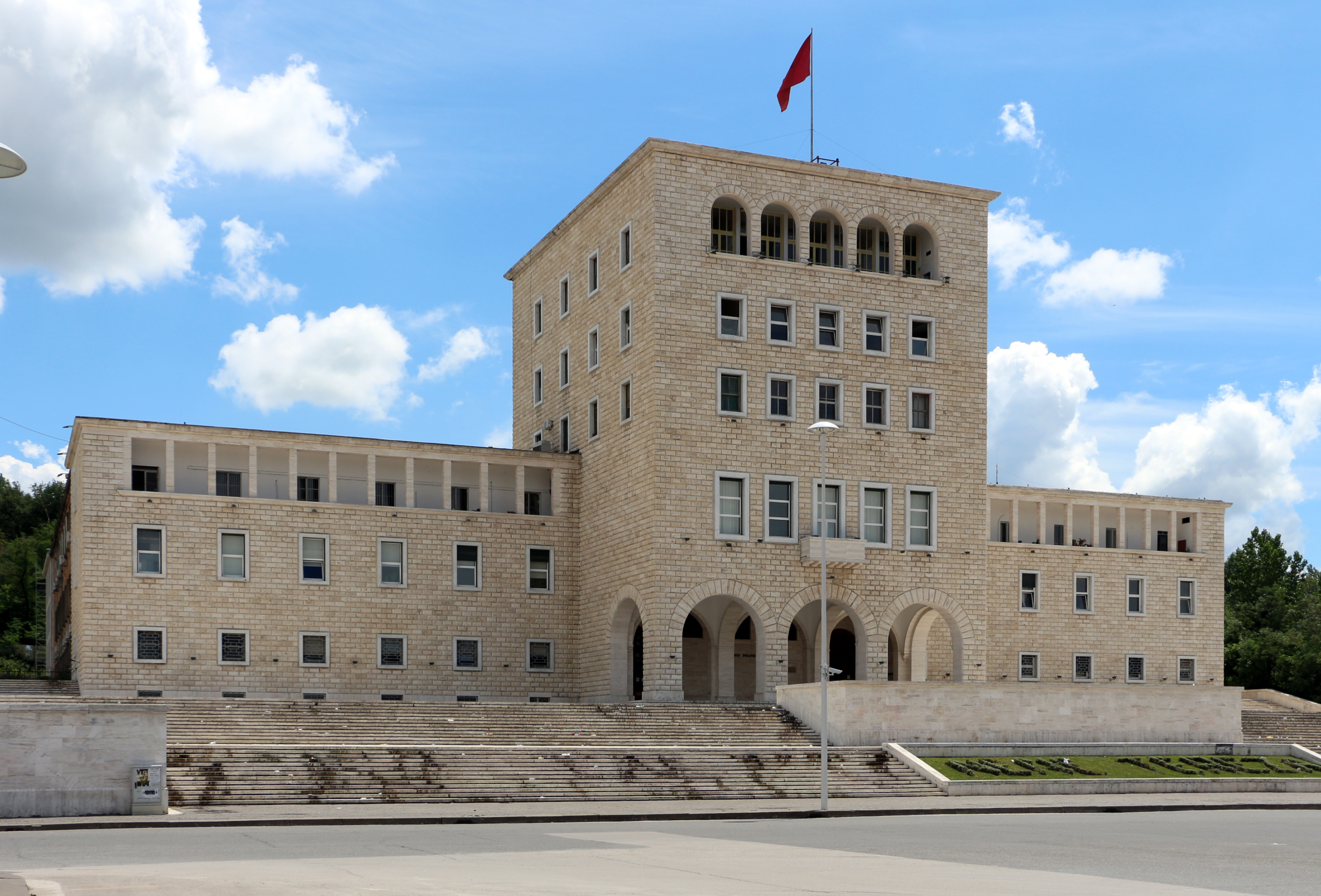 Universiteti I Tiranes